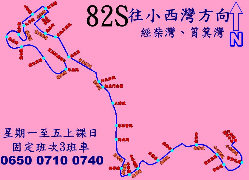 中文（香港）: 新巴82S線(往小西灣方向)的走線圖